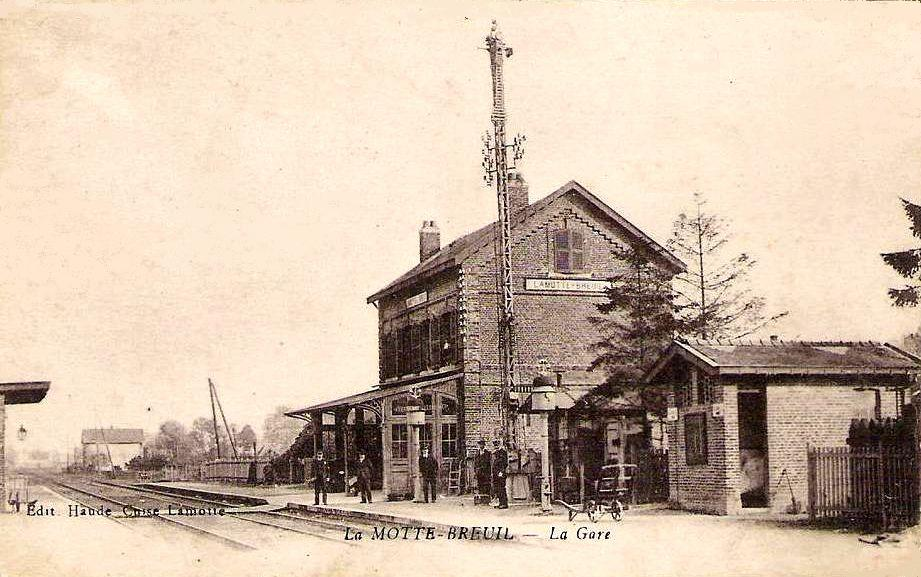 La gare côté voies.